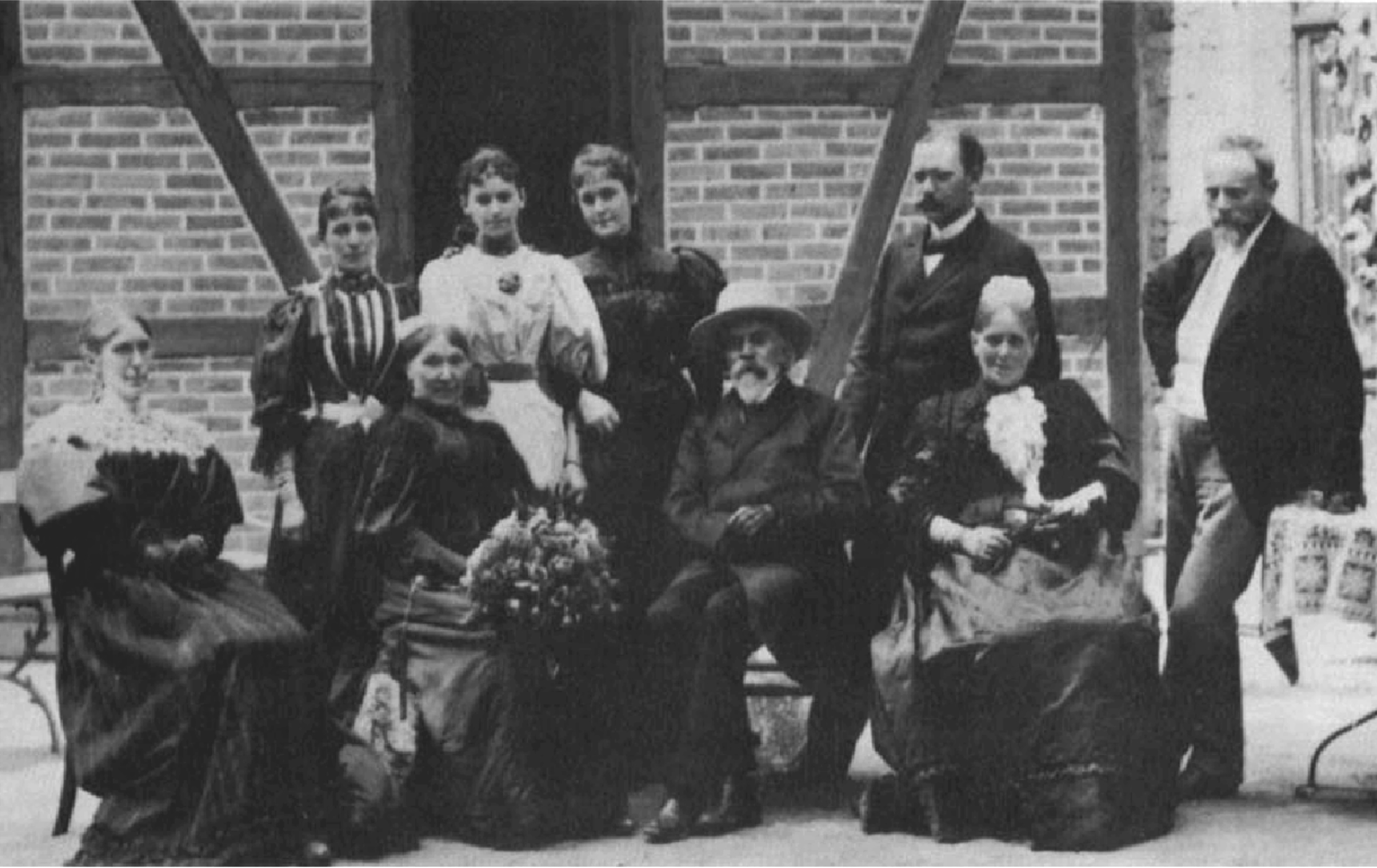 Altersruhesitz von Emil Erlenmeyer (Familienphoto) in Aschaffenburg. - 70. Geburtstag sitzend Emil Erlenmeyer sen. (* 28. Juni 1825 in Wehen bei Wiesbaden; † 22. Januar 1909 in Aschaffenburg) sitzend Auguste Erlenmeyer, geb. Hengstenberg (* xxxx Iserlohn; † 1897 Aschaffenburg), Heirat 1850 stehend Sohn Emil Erlenmeyer jun. (* 14. Juli 1864 in Heidelberg; † 14. Februar 1921 in Berlin) links sitzend Schwiegertochter (?) Elisabeth Erlenmeyer, geb. Moser (?) drei Töchter im Bild, Sohn Hans (* 20. März 1900 in Straßburg) wurde erst fünf Jahre später geboren rechts sitzend Tochter Maria Dingler, geb. Erlenmeyer stehend Schwiegersohn Hermann Dingler (* 23. Mai 1846 in Zweibrücken; † 30. Dezember 1935 in Aschaffenburg) nicht im Bild Sohn Hugo Dingler (* 7. Juli 1881)